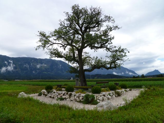 Naturdenkmal Birnbaum auf dem Walserfeld, Österreich This media shows the natural monument in Salzburg with the ID NDM00014.